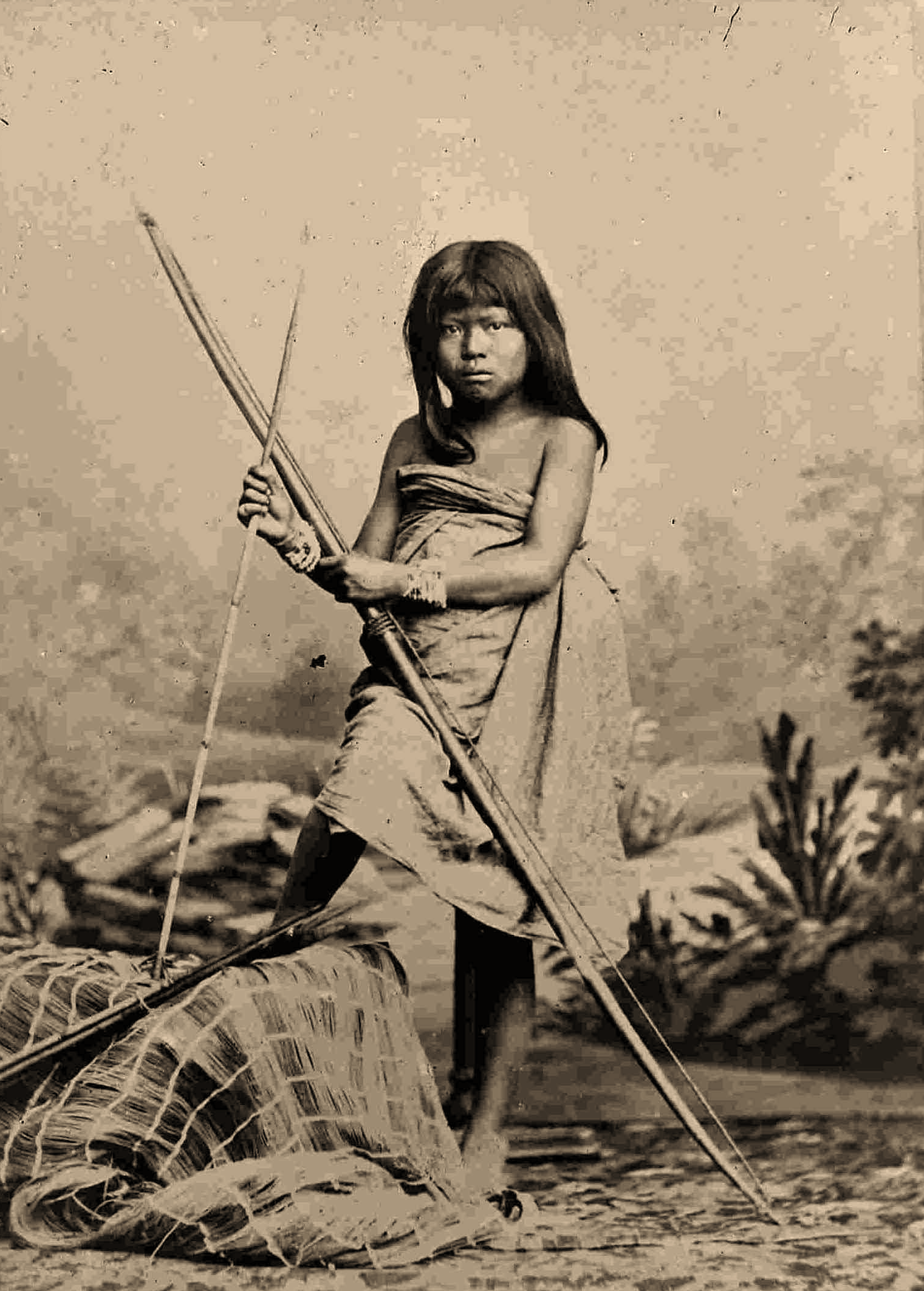 Payaguá